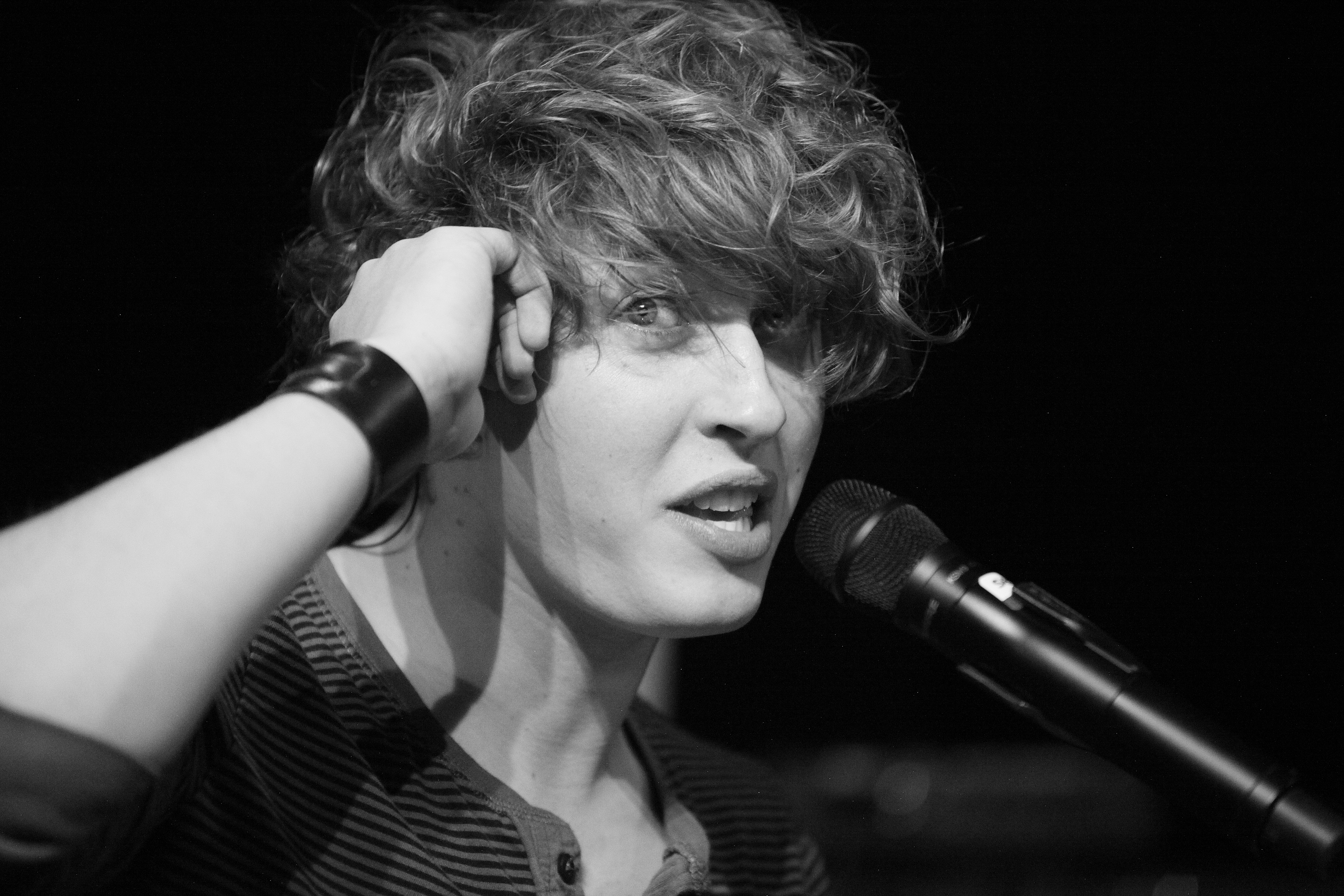 Tiemo Hauer bei einem Konzert in Reutlingen